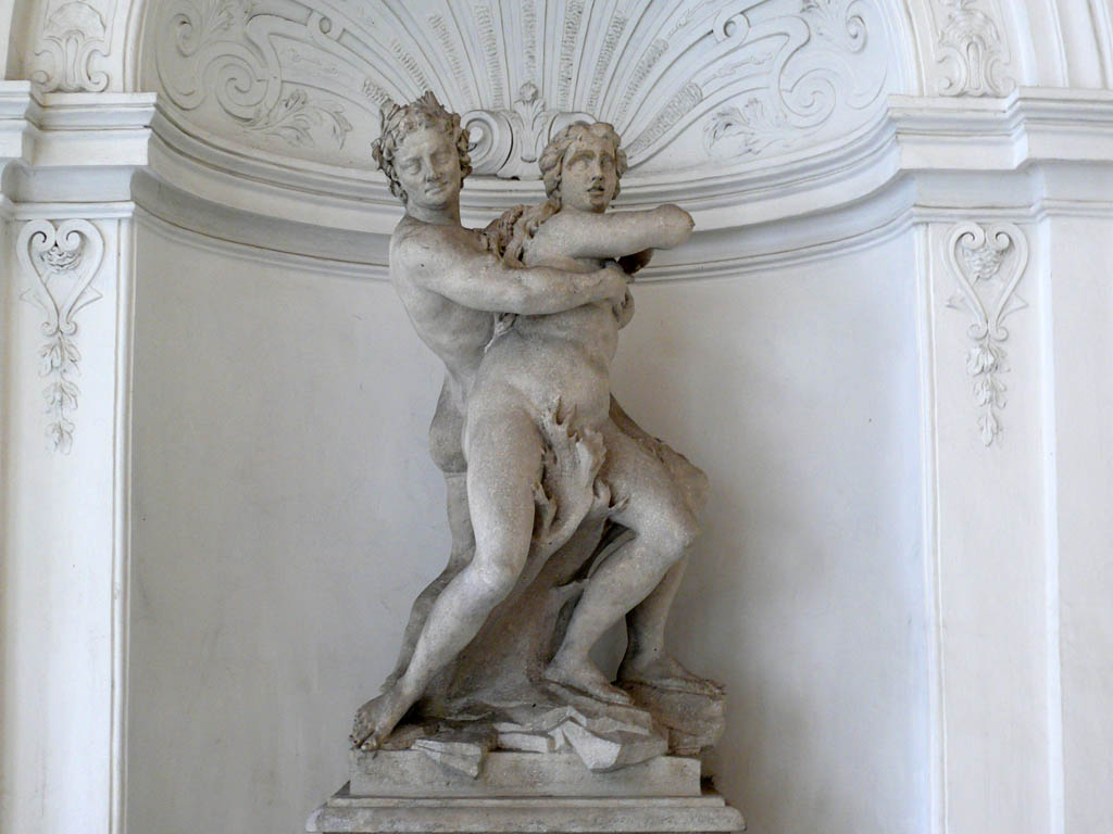 Palais Kinsky, Eingangshalle, Skulpturengruppe "Apollo und Daphne" von Josef Kracker